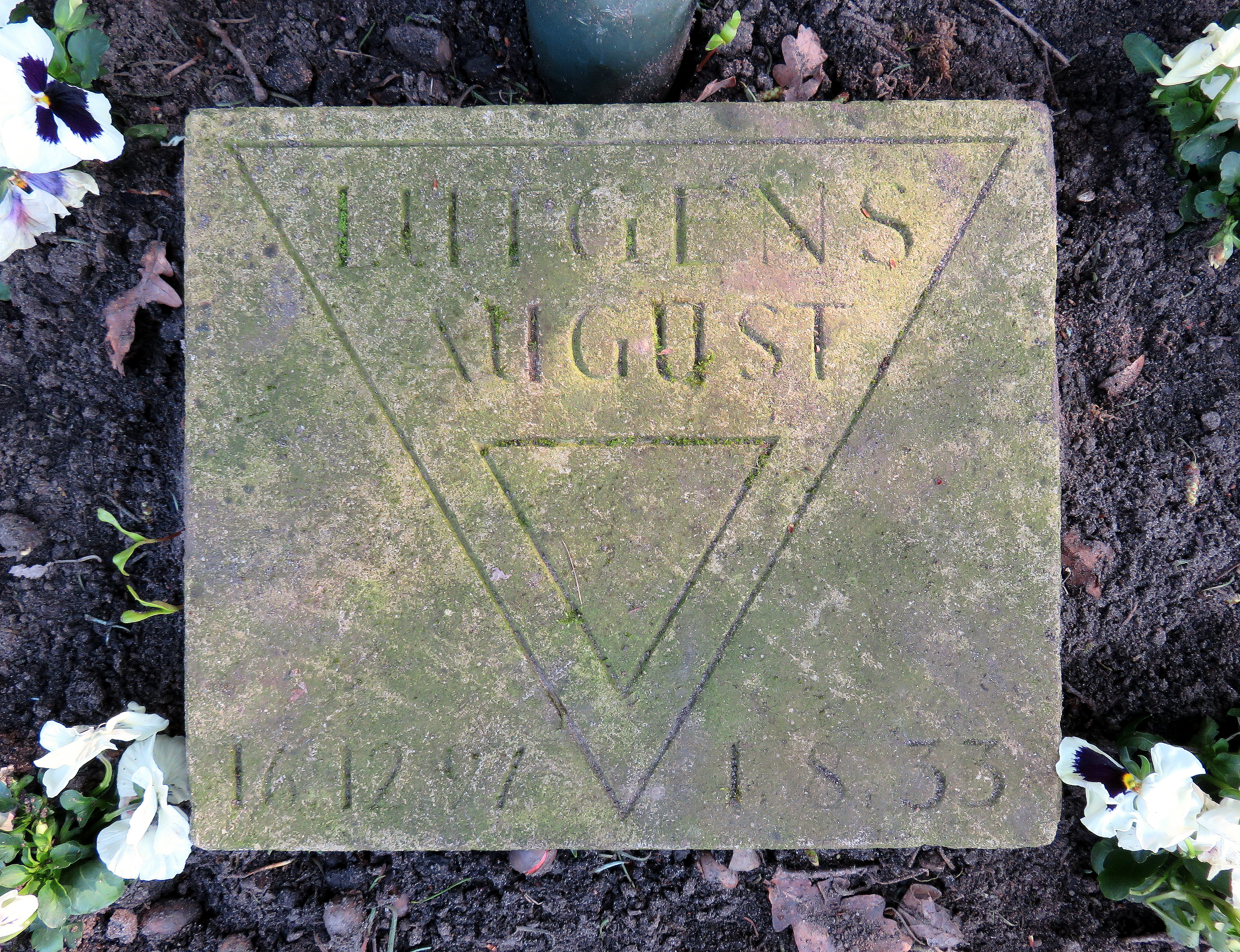 Kissenstein für den deutschen Widerstandskämpfer August Lütgens im Ehrenhain Hamburgischer Widerstandskämpfer, Friedhof Ohlsdorf, Planquadrat K 5 (Bergstraße gegenüber dem Museum).